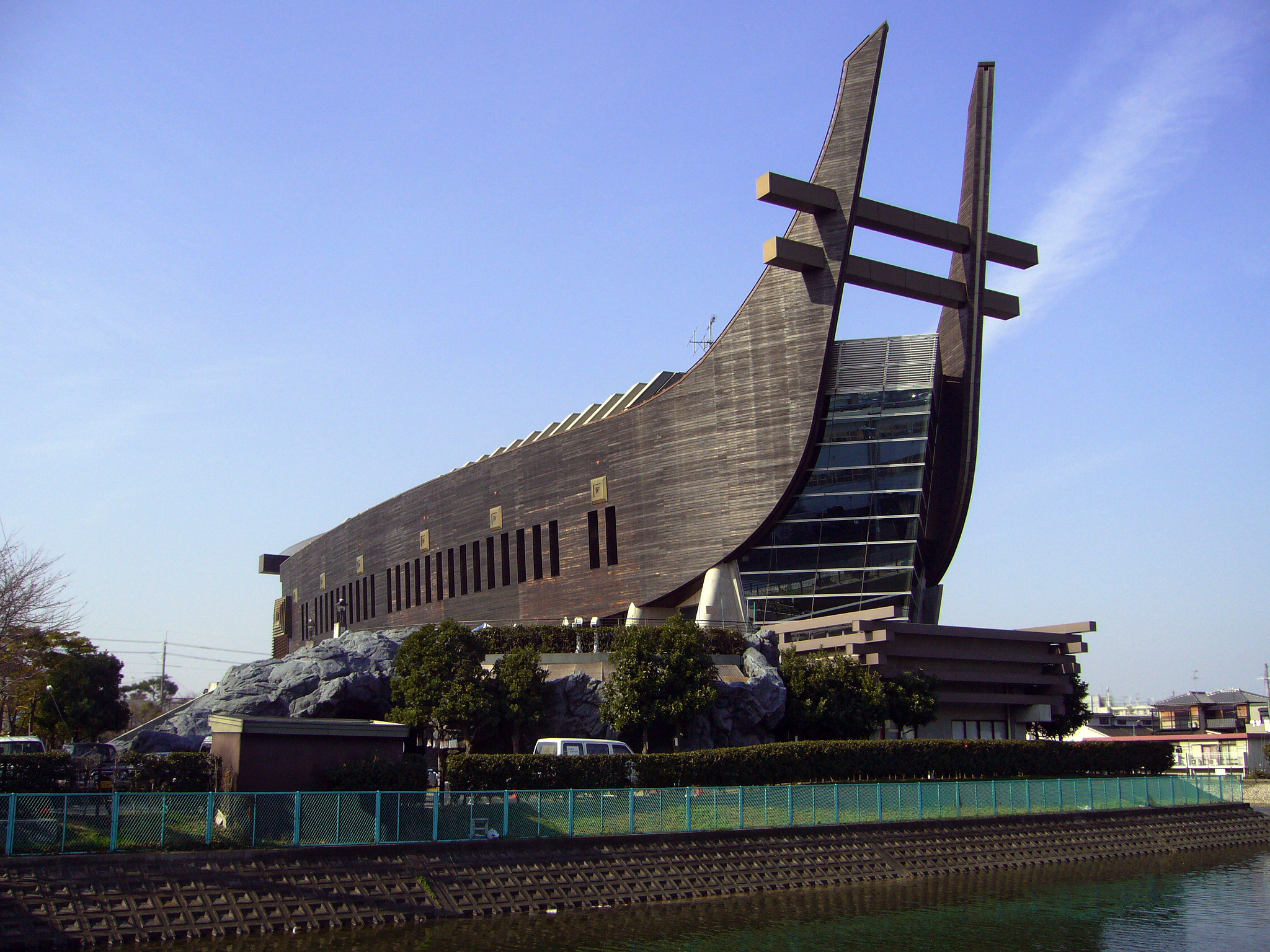 Aiserushura-hall in Fujiidera, Osaka, Japan